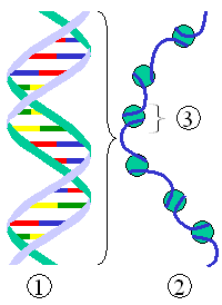 Nucleosoom, bewerking van Image:Chromatin chromosome.png